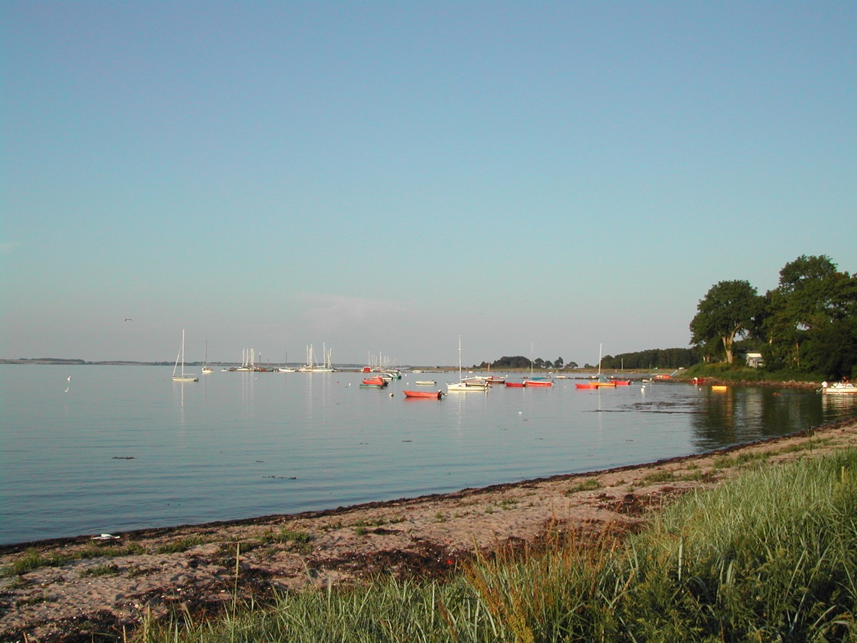 Flensburger Förde von Bockholmvik aus gesehen